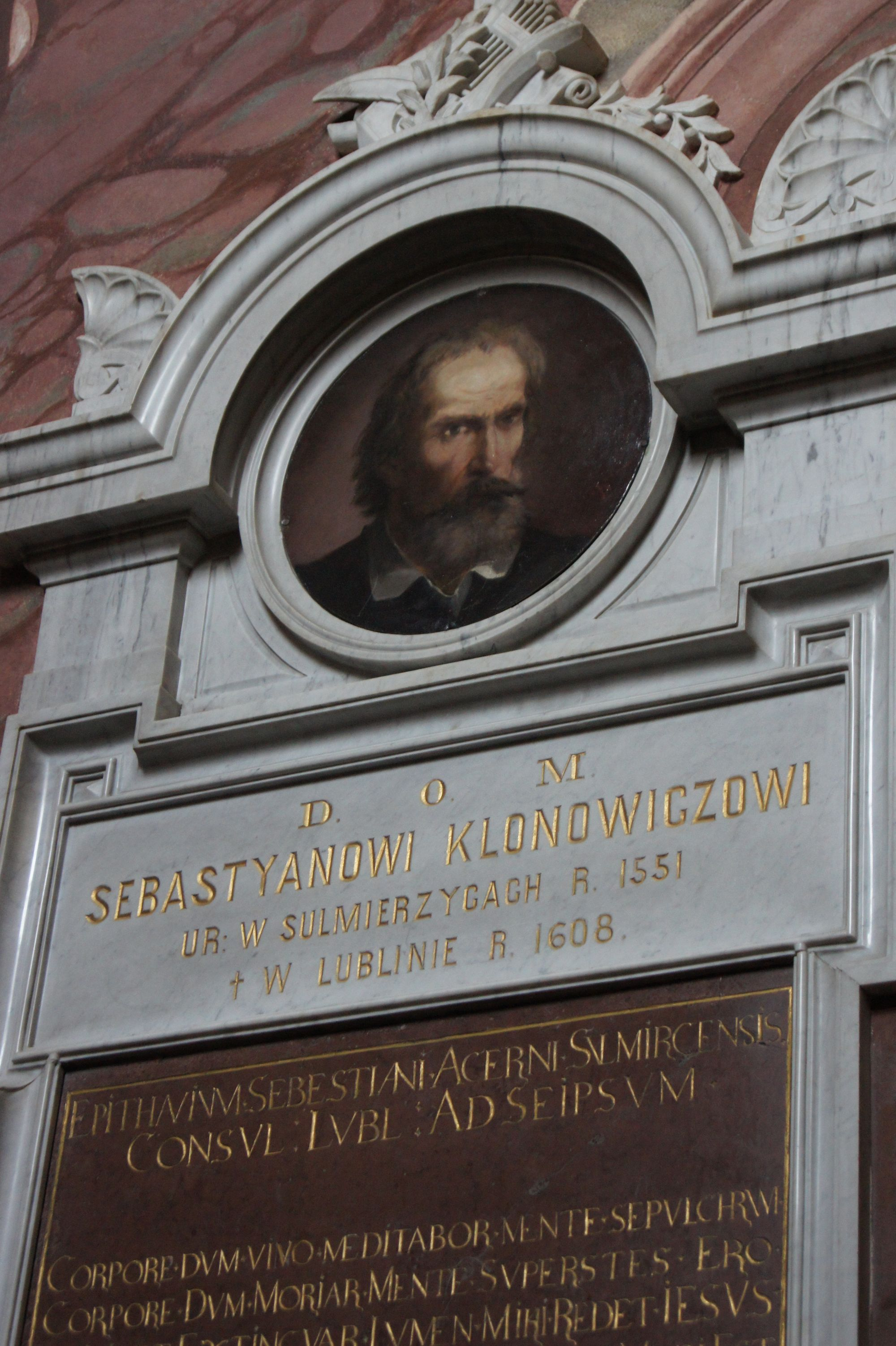 Epitafium Sebastiana Fabiana Klonowica znajdujące się w archikatedrze w Lublinie.